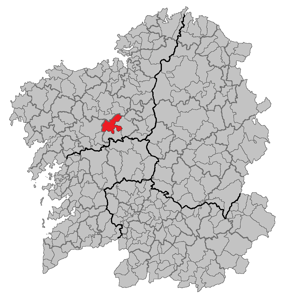 Mapa coa localización do concello de Noia.